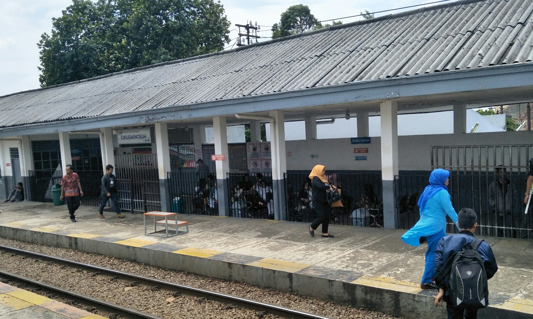 Stasiun Cikudapateuh